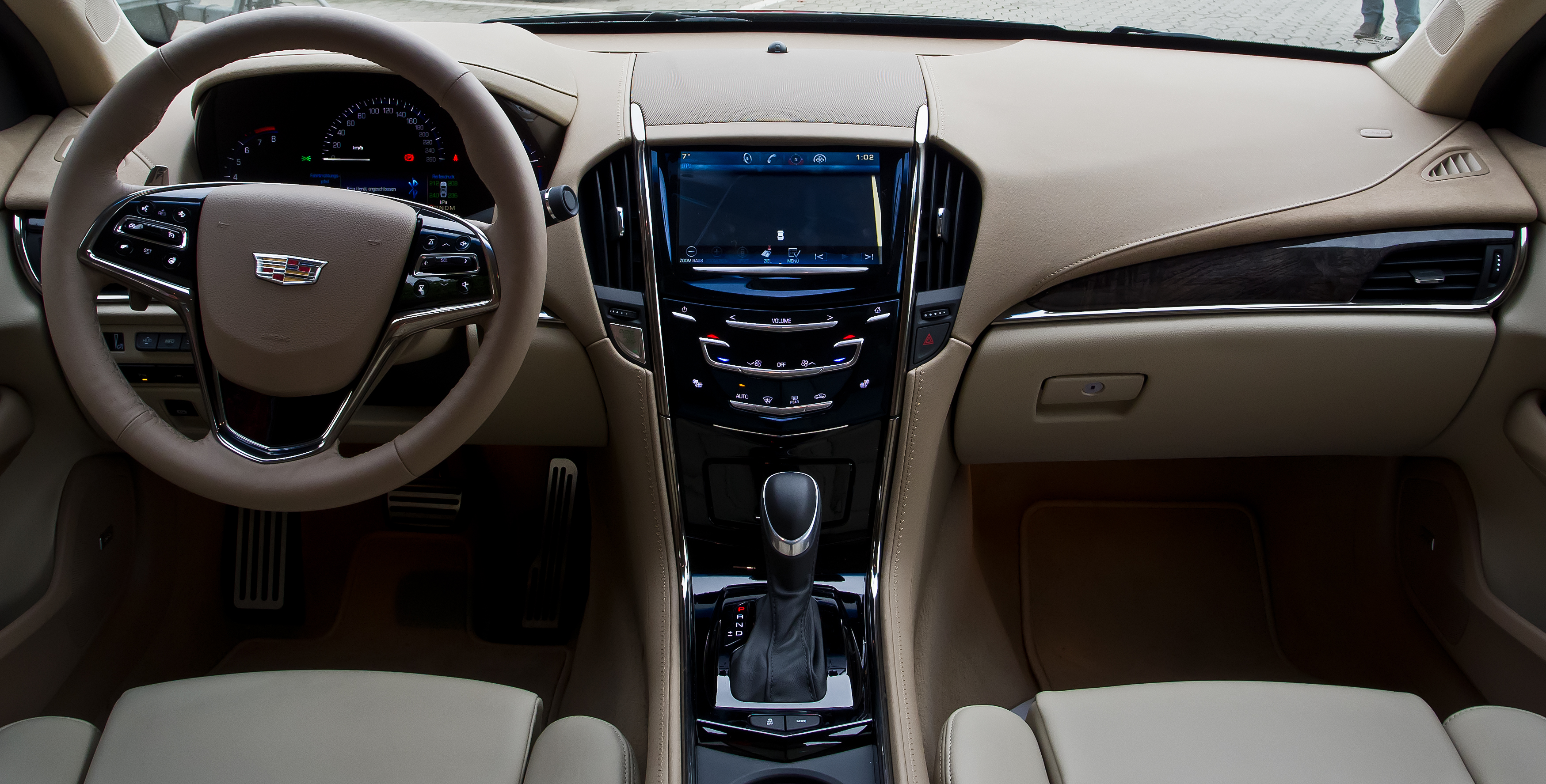 Cadillac ATS 2.0 Turbo AWD Premium